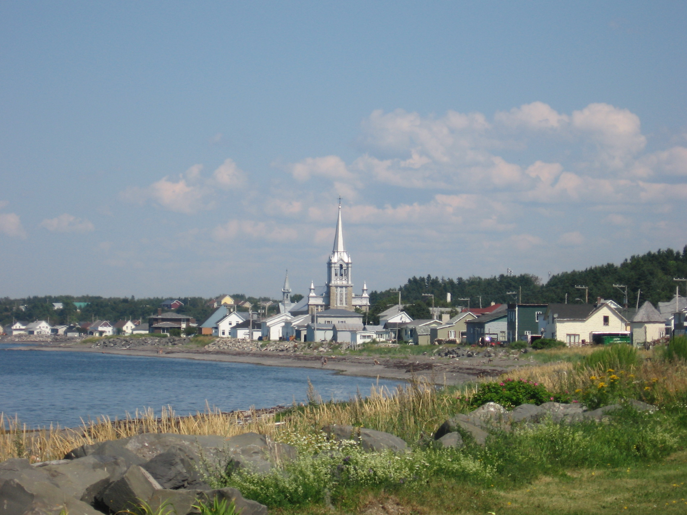 Village de Saint-Ulric